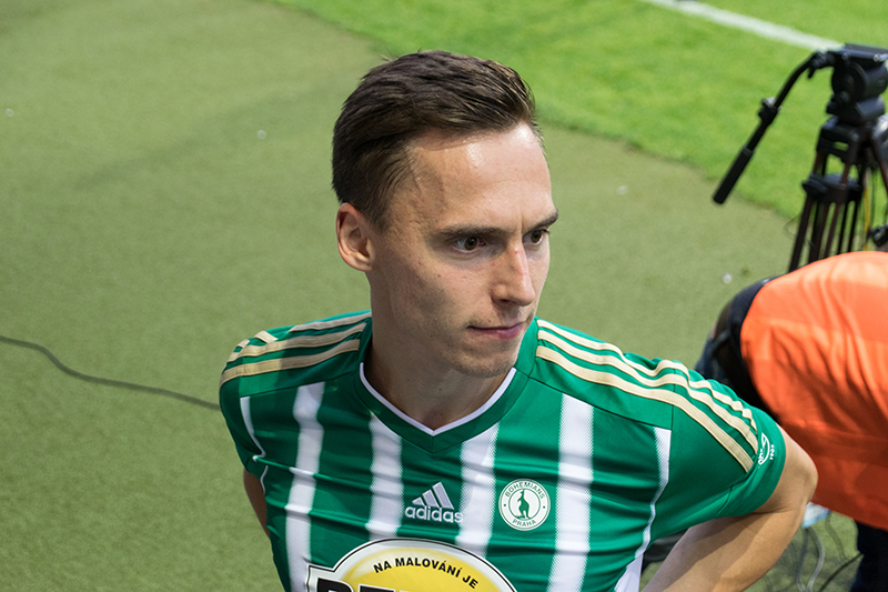 Siim Luts